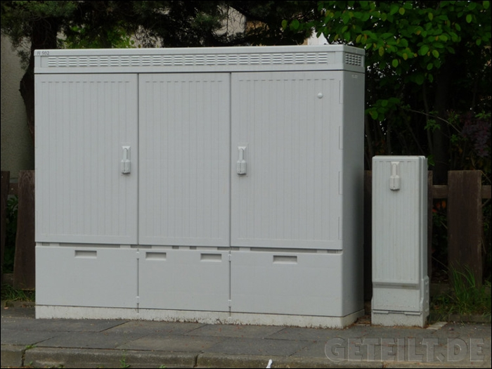 Multifunnktionsgehäuse 18, beinhaltet Technik zur Bereitstellung von DSL in verschiedenen Ausbaustufen